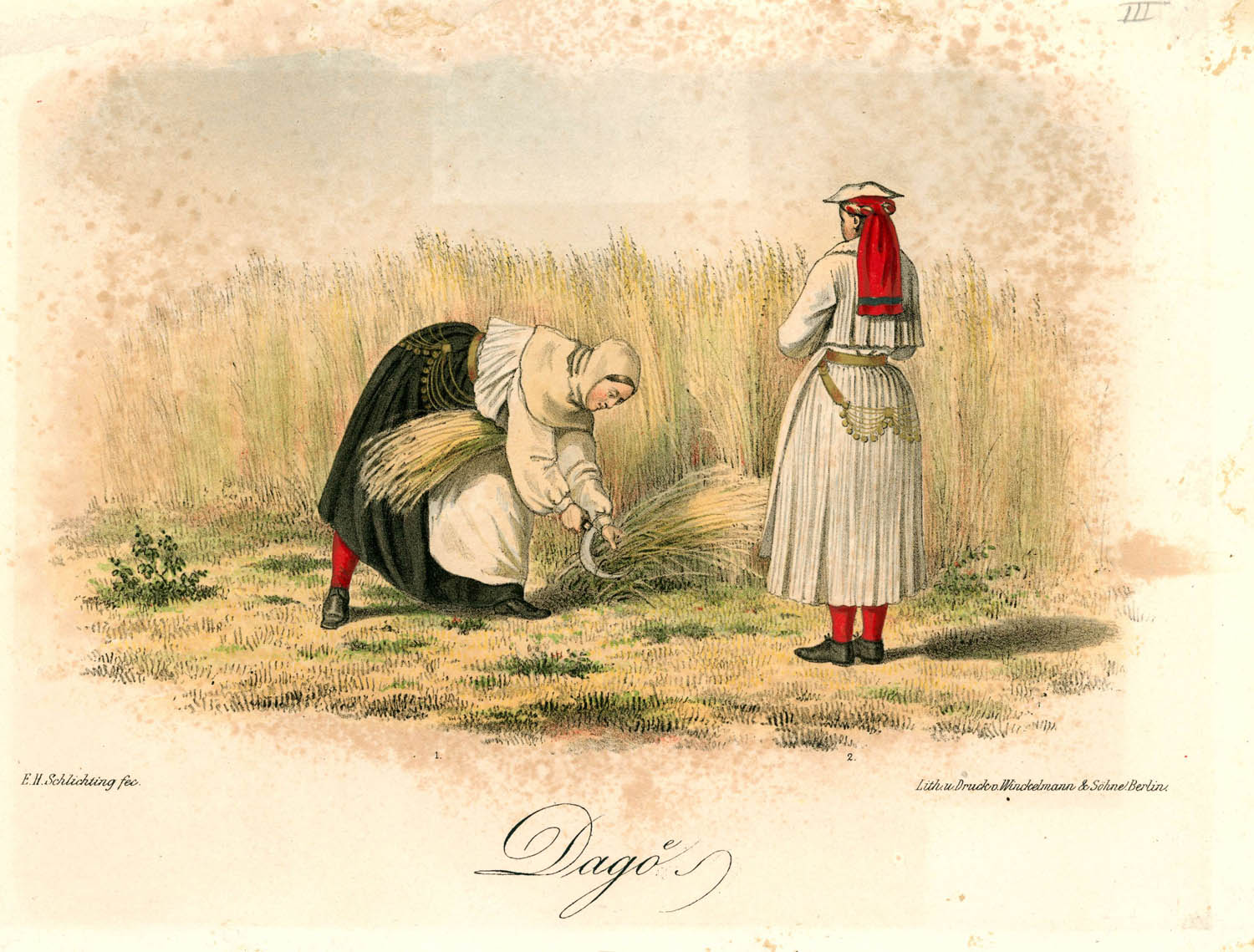 Folkdräkt, Dagö, Estland. Litografi av E. H. Schlichting. "Lith.u. Druck v. Winckelmann & Söhne. Berlin".